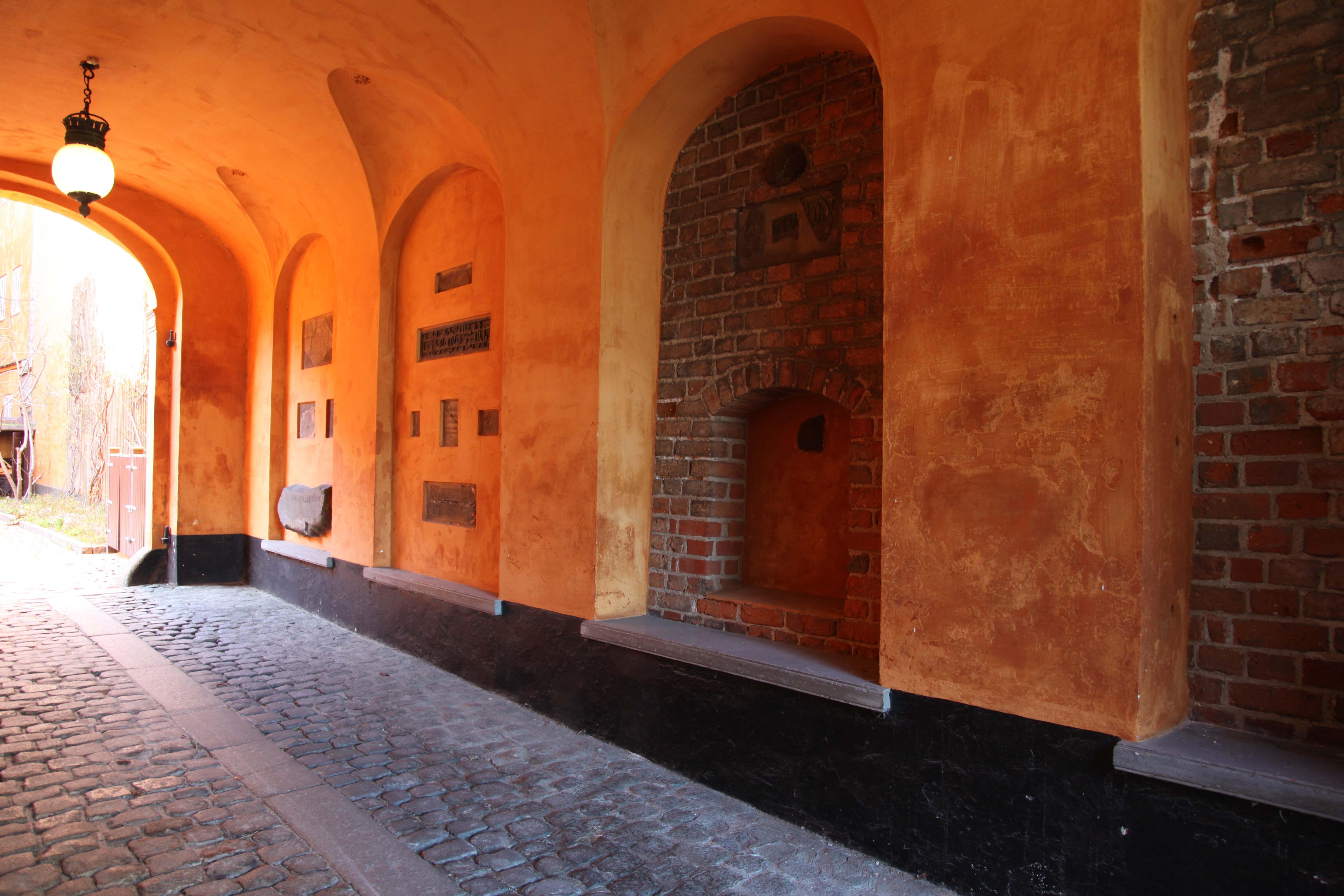 Bispegårdens portrum med de indmurede indskrifter